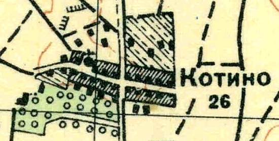 Топографическая карта Ленинградской области, квадрат О-35-24-А-а (Клясина), деревня Котино